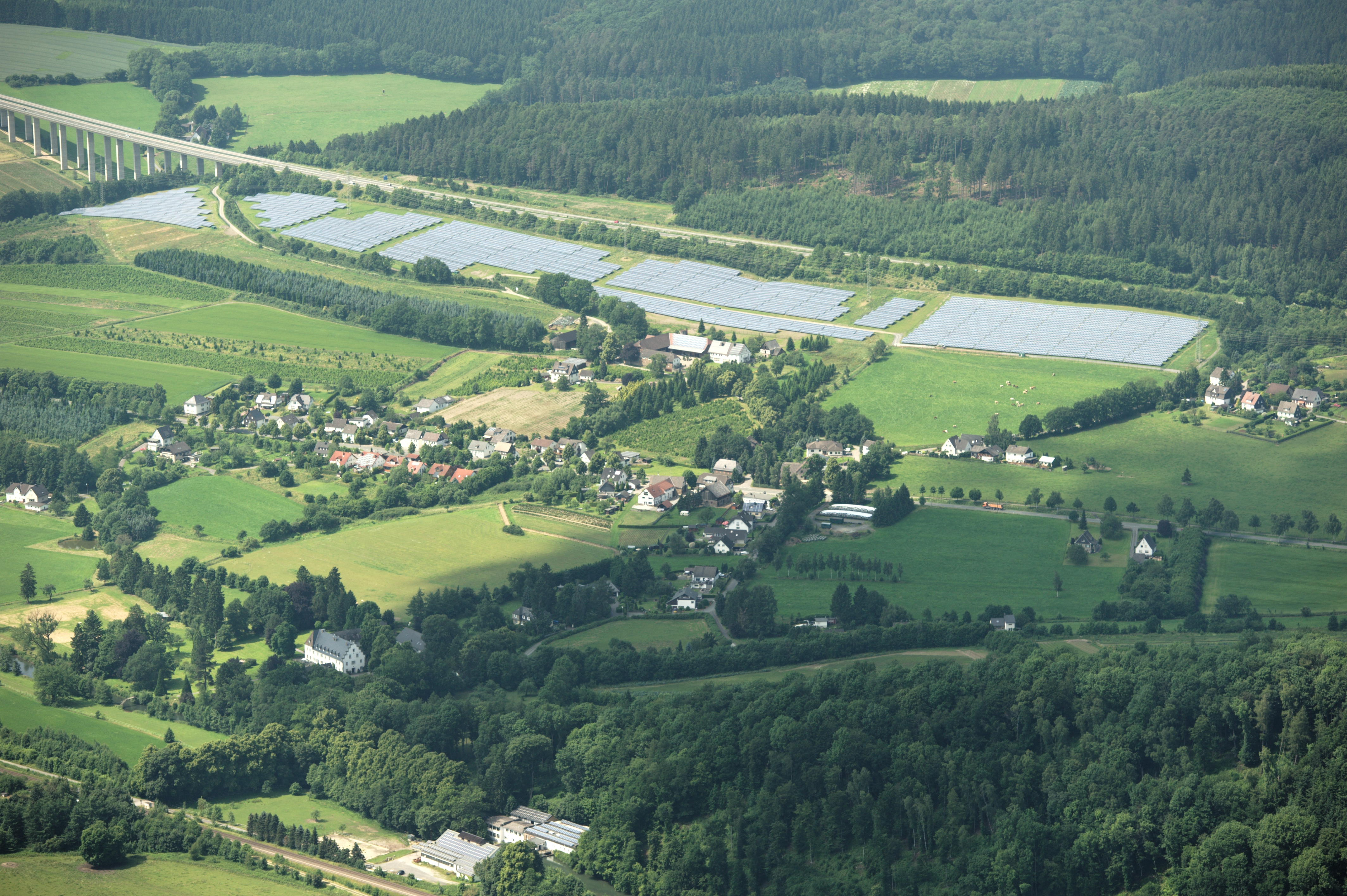 Fotoflug Sauerland-Ost – Meschede-Stockhausen mit Gut Stockhausen im Vordergrund. Unterhalb der A 46 eine große Anlage zur Erzeugung von Solarstrom The making of this document was supported by the Community-Budget of Wikimedia Germany.